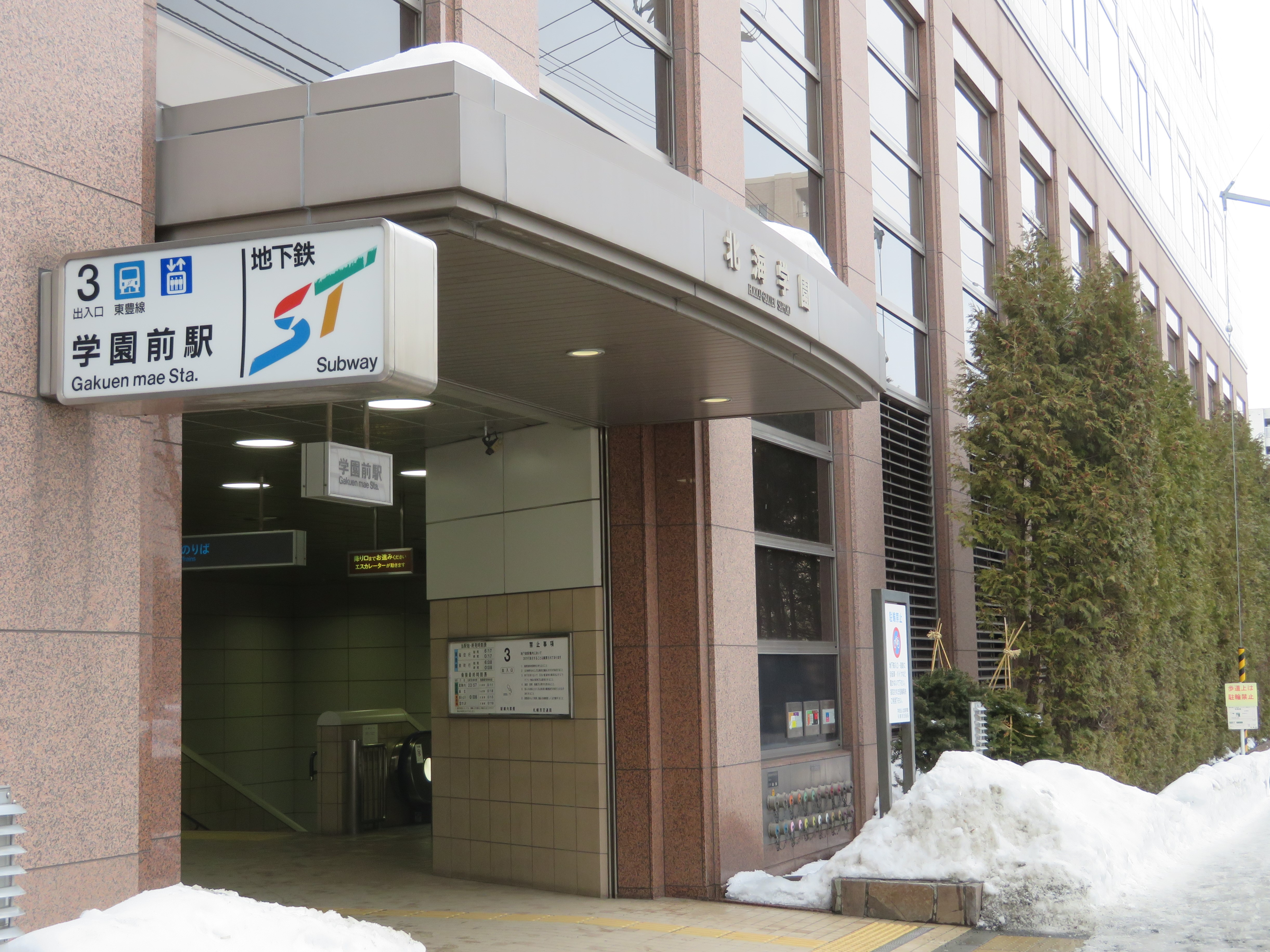 学園前駅3番出入口 Canon PowerShot SX720 HS